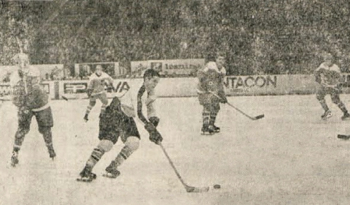 Srečanje med Jugoslavijo in Avstrijo.